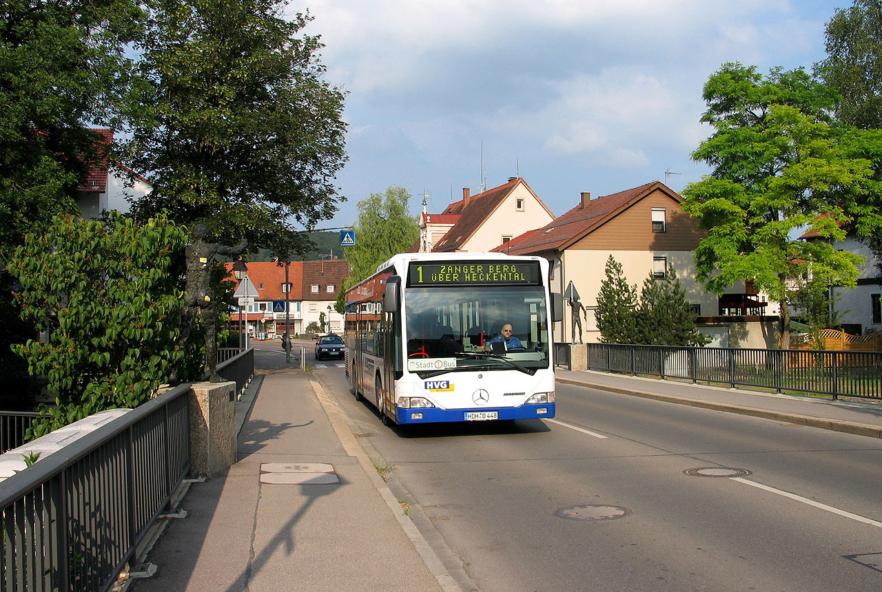 Stadtbus auf der Linie 1 im Ortsteil Schnaitheim.